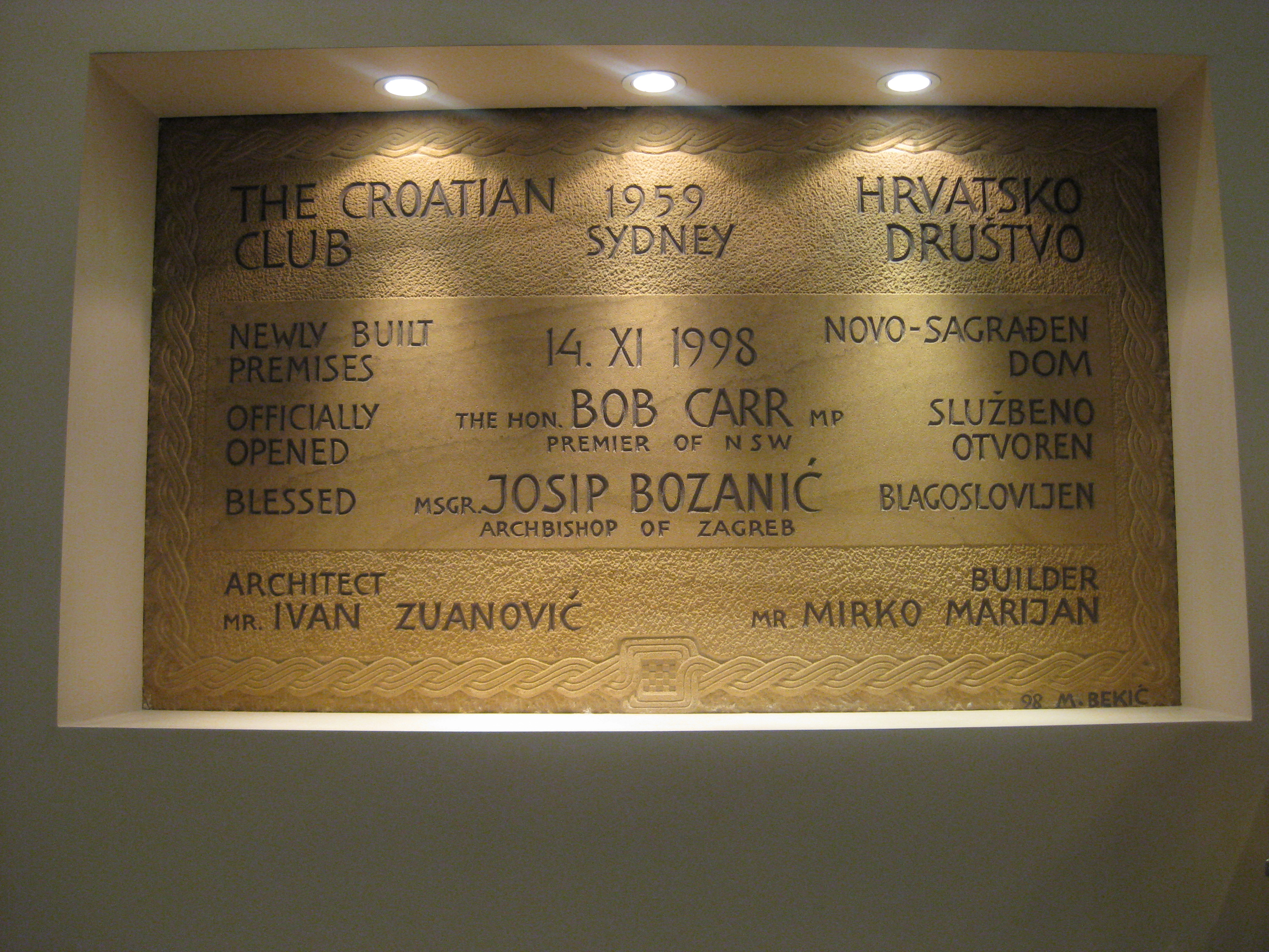 Spomen ploča u zgradi Hrvatskog društva Sydney